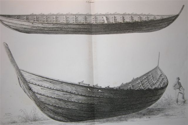 Nydam Boat